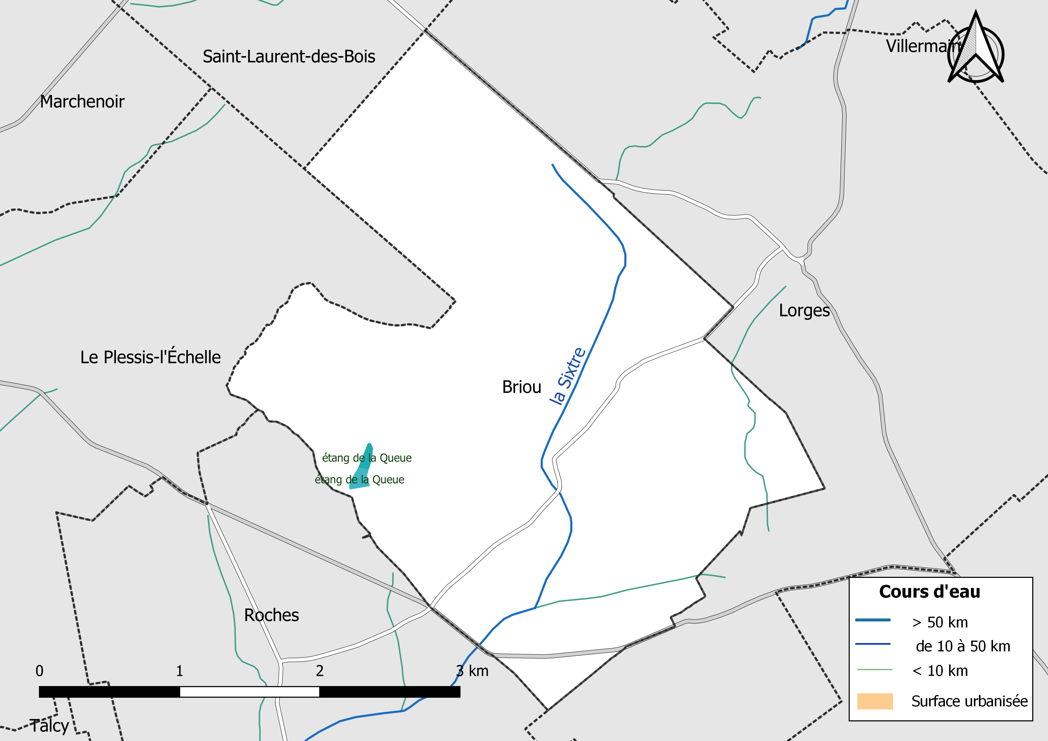 Carte du réseau hydrographique de la commune de Briou (Loir-et-Cher, France).